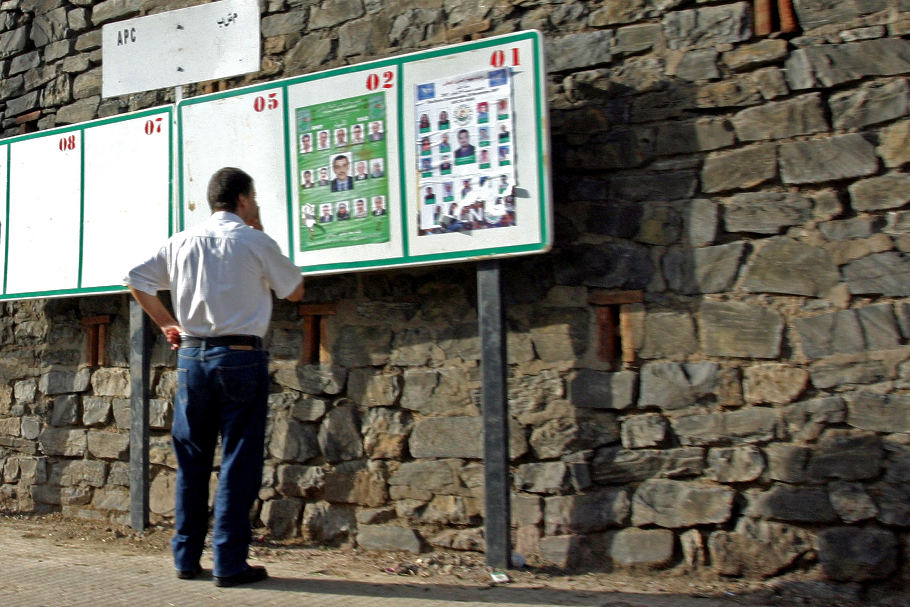 Election monitors in Algeria are accusing authorities of violating procedures in the run up to the May 10th legislative poll. مراقبو الانتخابات في الجزائر يتهمون السلطات بخرق الإجراءات قبيل انتخابات 10 مايو التشريعية. Les observateurs des élections en Algérie accusent les autorités de ne pas respecter les procédures à l'approche des élections législatives du 10 mai.